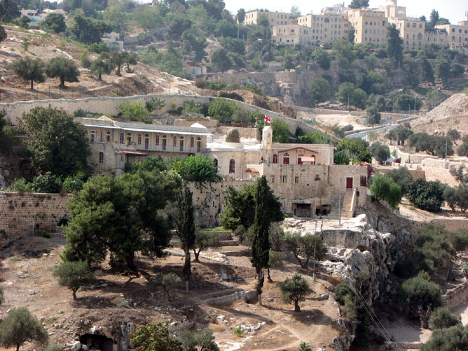 he:חקל דמא מכיוון he:כפר השילוח, ברקע מימין מלון הר ציון (לשעבר בית החולים לעיניים)